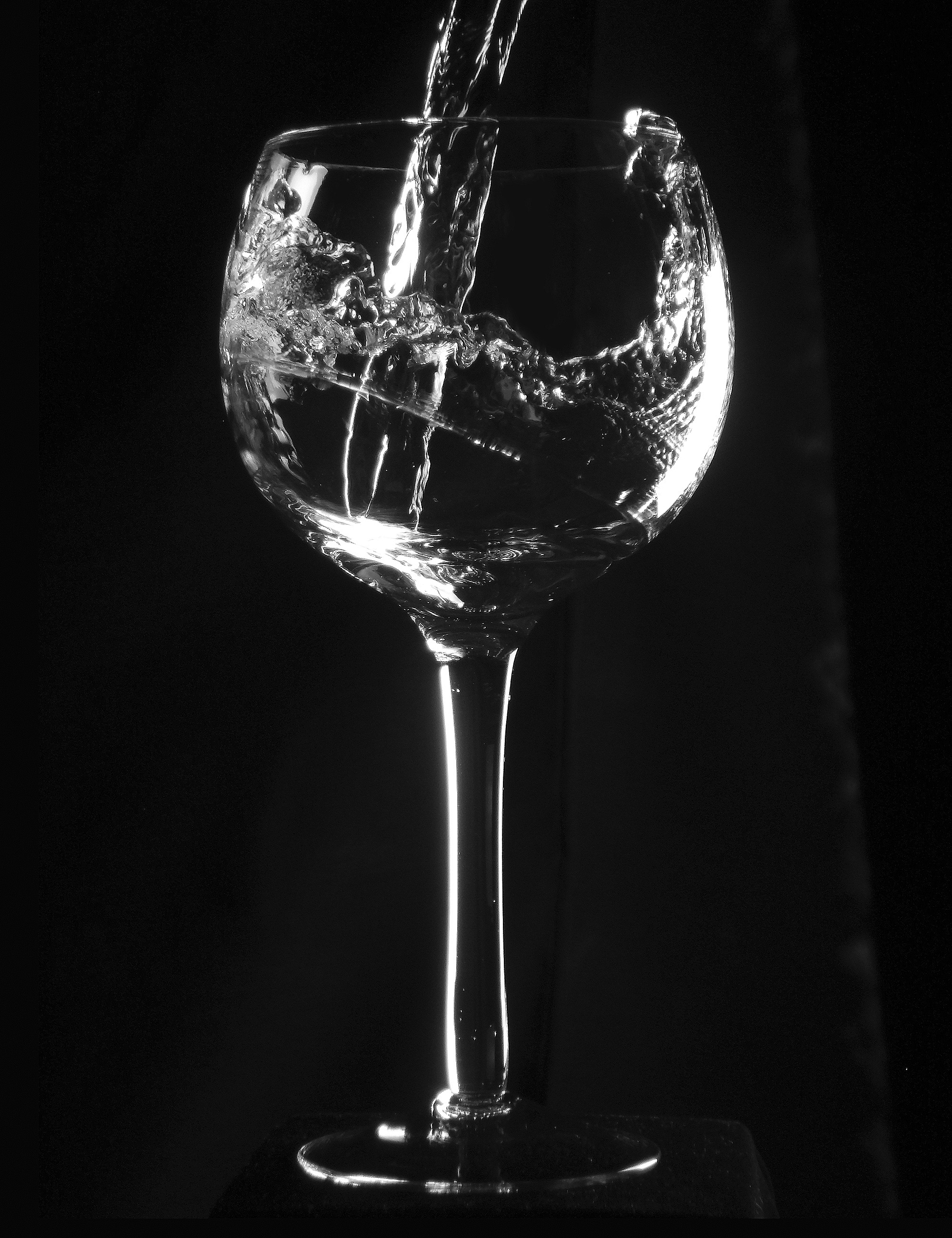 Glass of water.